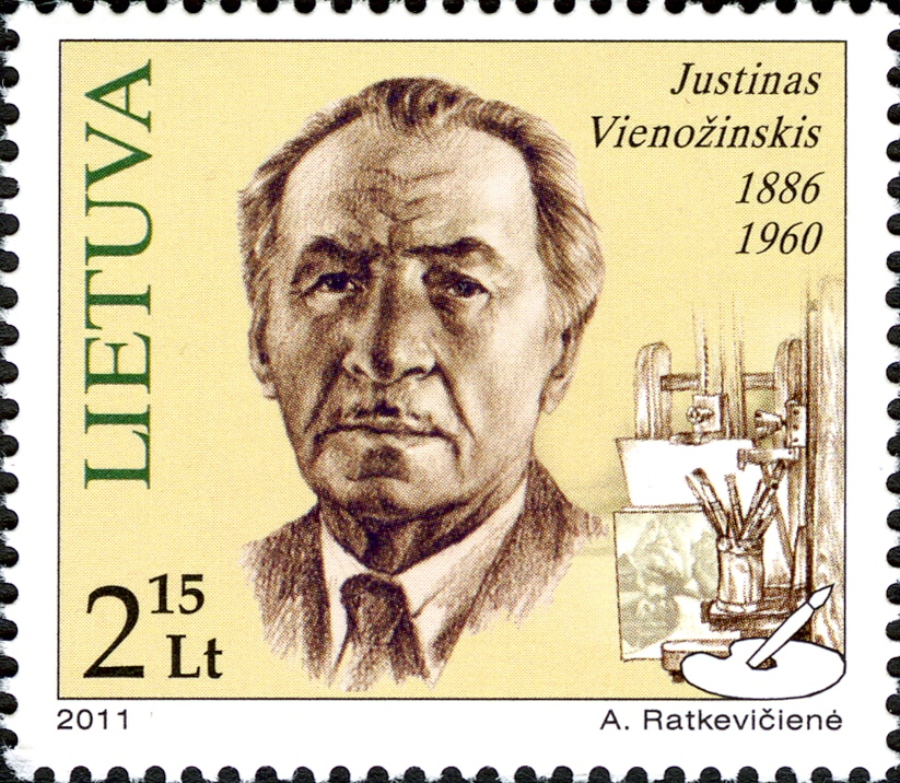 Famous People - Justinas Vienožinskis